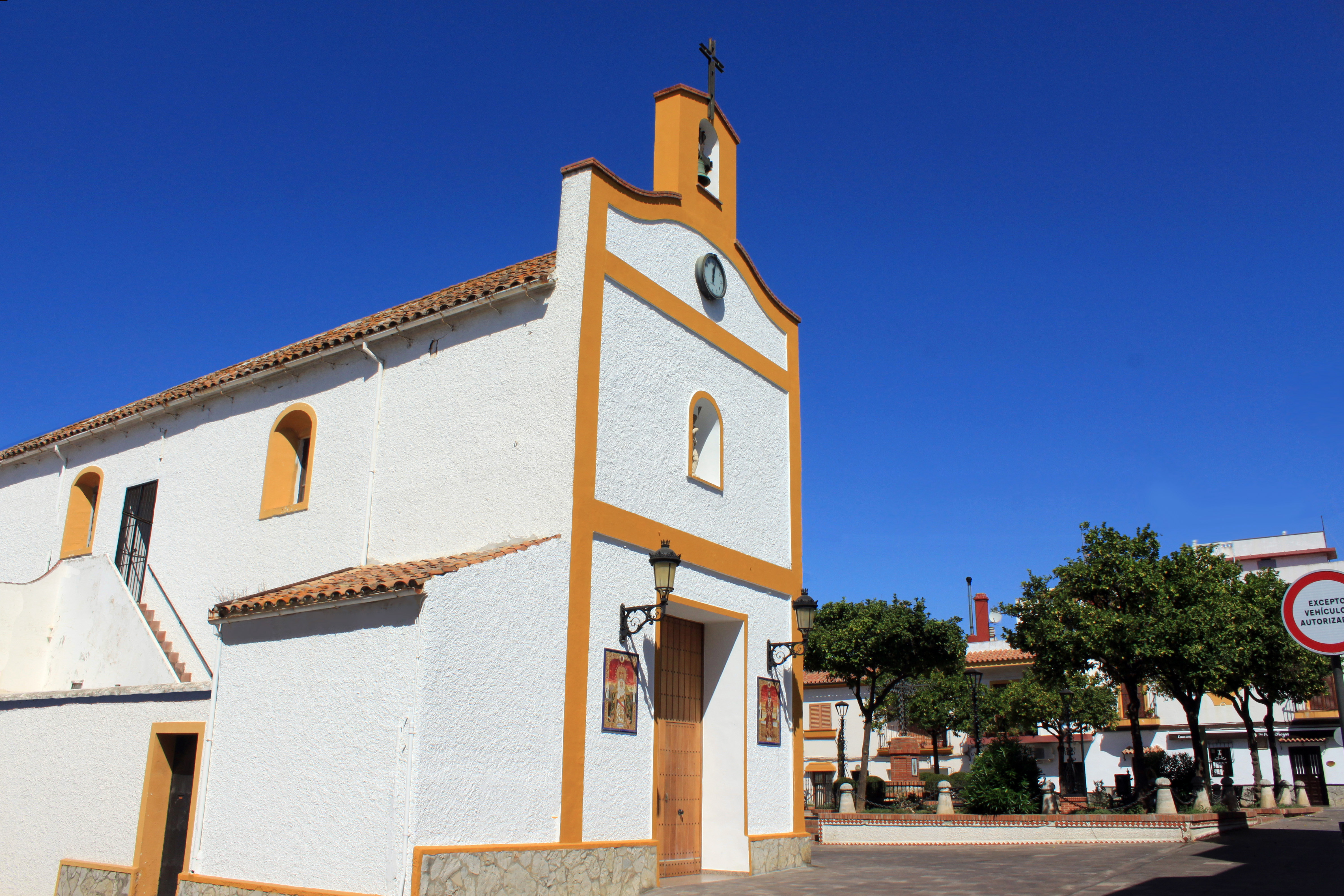 Vista de la Capilla de San Isidro situada en la barriada del mismo nombre en Algeciras, España.